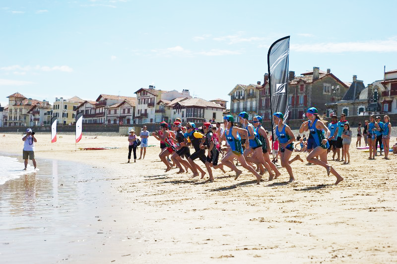 Compétition sauvetage-côtier à Saint-Jean-de-Luz (France)